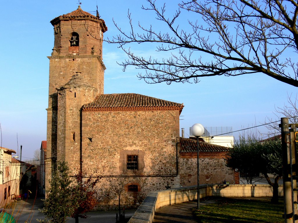 Iglesia de la Asunción en Villar de Torre (La Rioja, España).